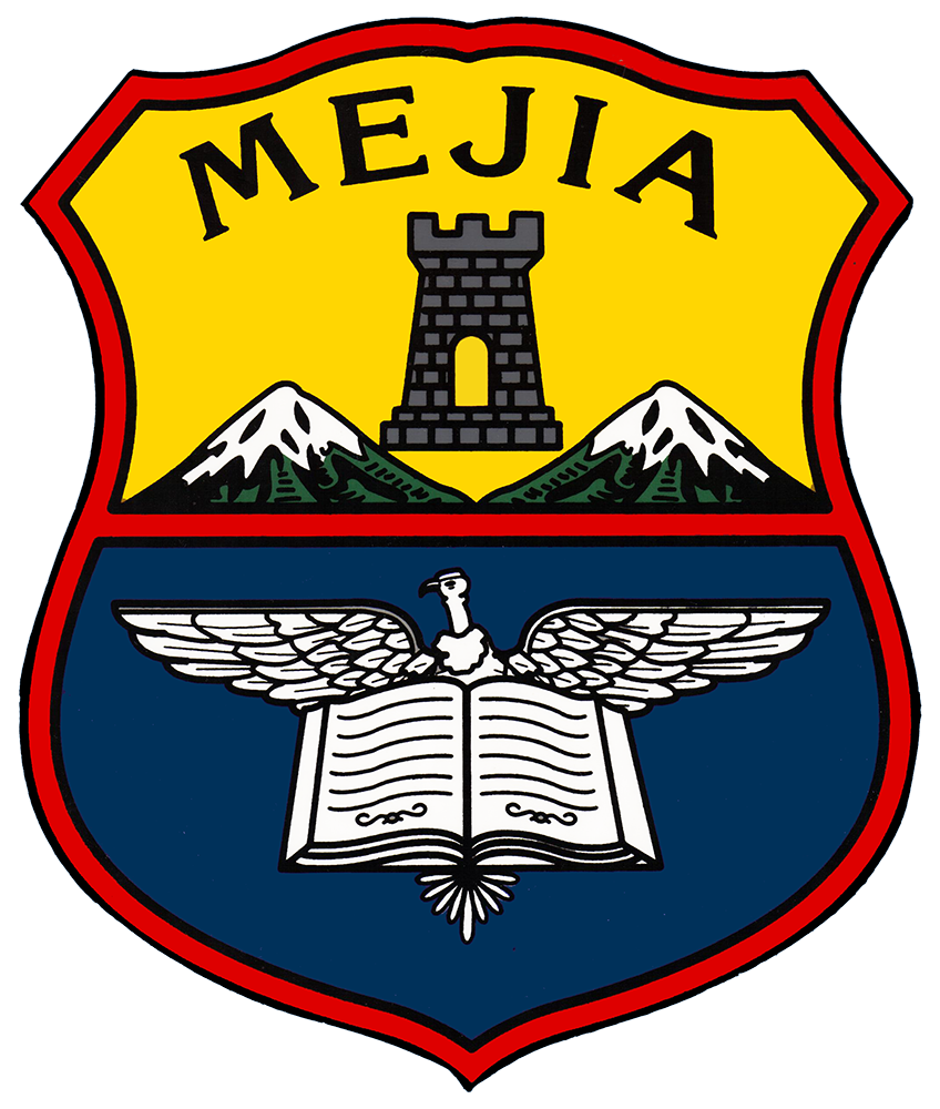 Diseño del logo del Instituto Nacional Mejía